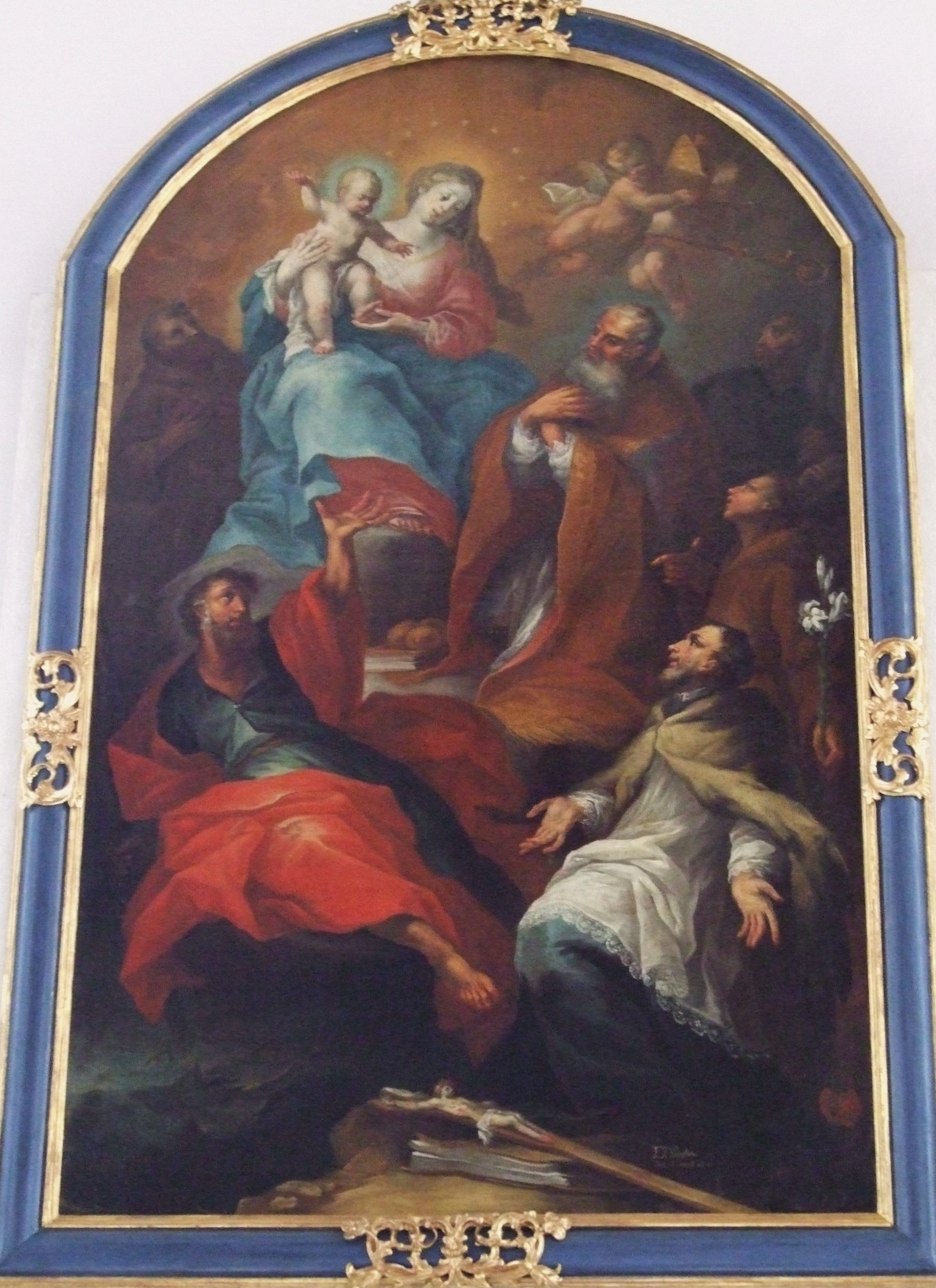 Spiegler Altarbild "Maria von verschiedenen (Franziskaner-) Heiligen verehrt"in der Kirche St. Bartholomäus in Erisdorf in der Gemeinde Ertingen-Erisdorf, Deutschland